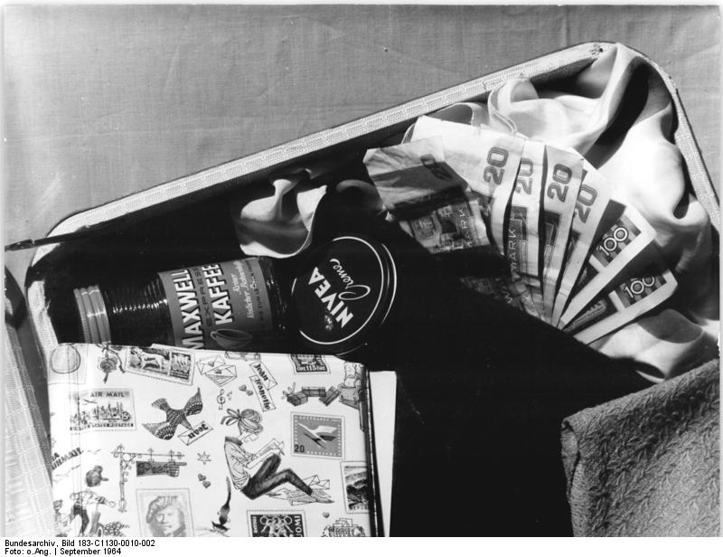 Zentralbild 30.11.1964 Beispiele für Währungsspekulationen mit Mark der Deutschen Notenbank Franziska Fiedler aus Bottrop, Schayerbruch 59, versuchte am 1.9.1964 illegal 600 MDN in die DDR einzuführen. Sie hatte das Geld bei einer Wechselstube in Bottrop zum Schwindelkurs umgetauscht und es unter den mitgeführten Sachen in ihrem Reisekoffer versteckt.